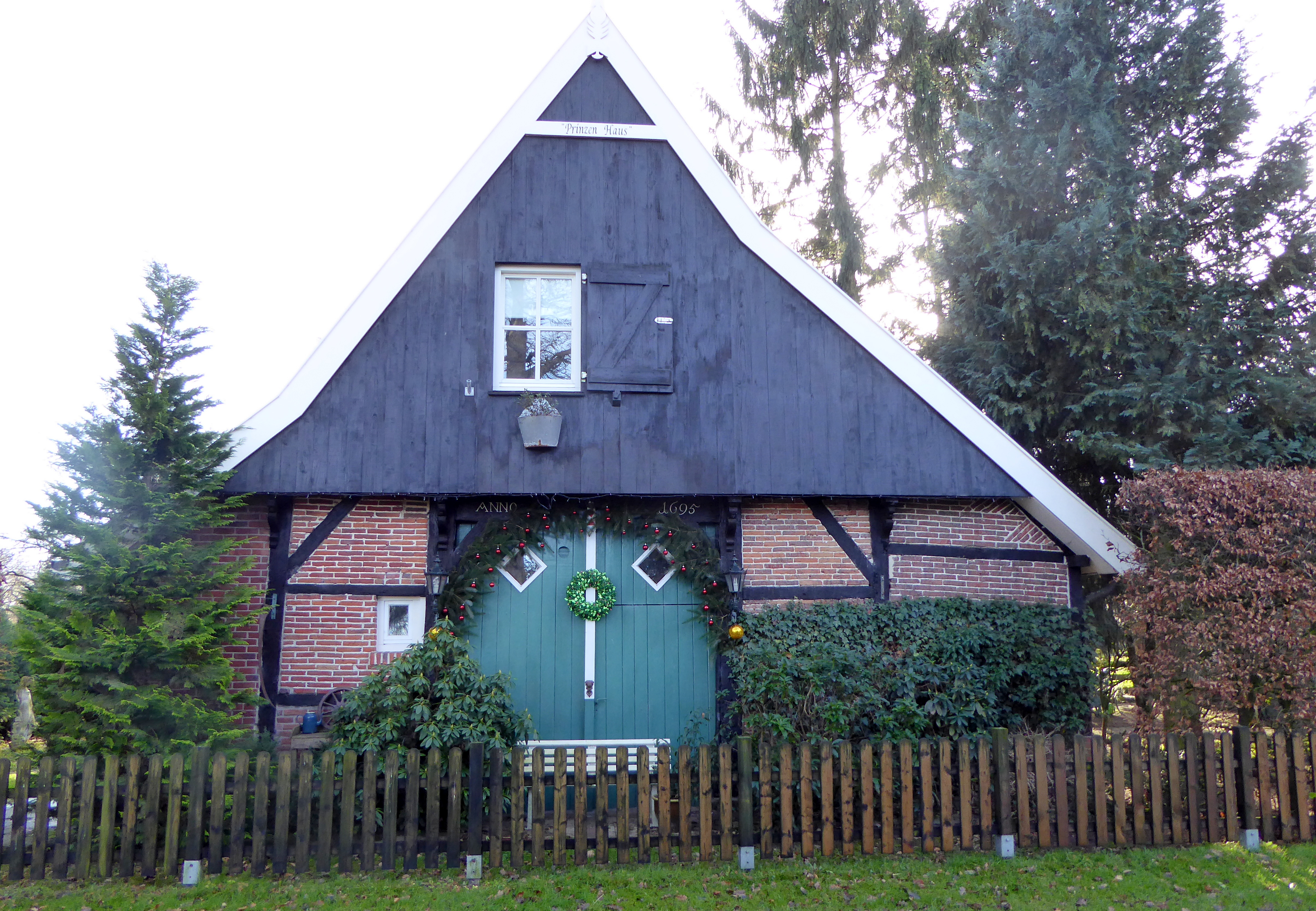 Alter Bauernhof in Frenswegen